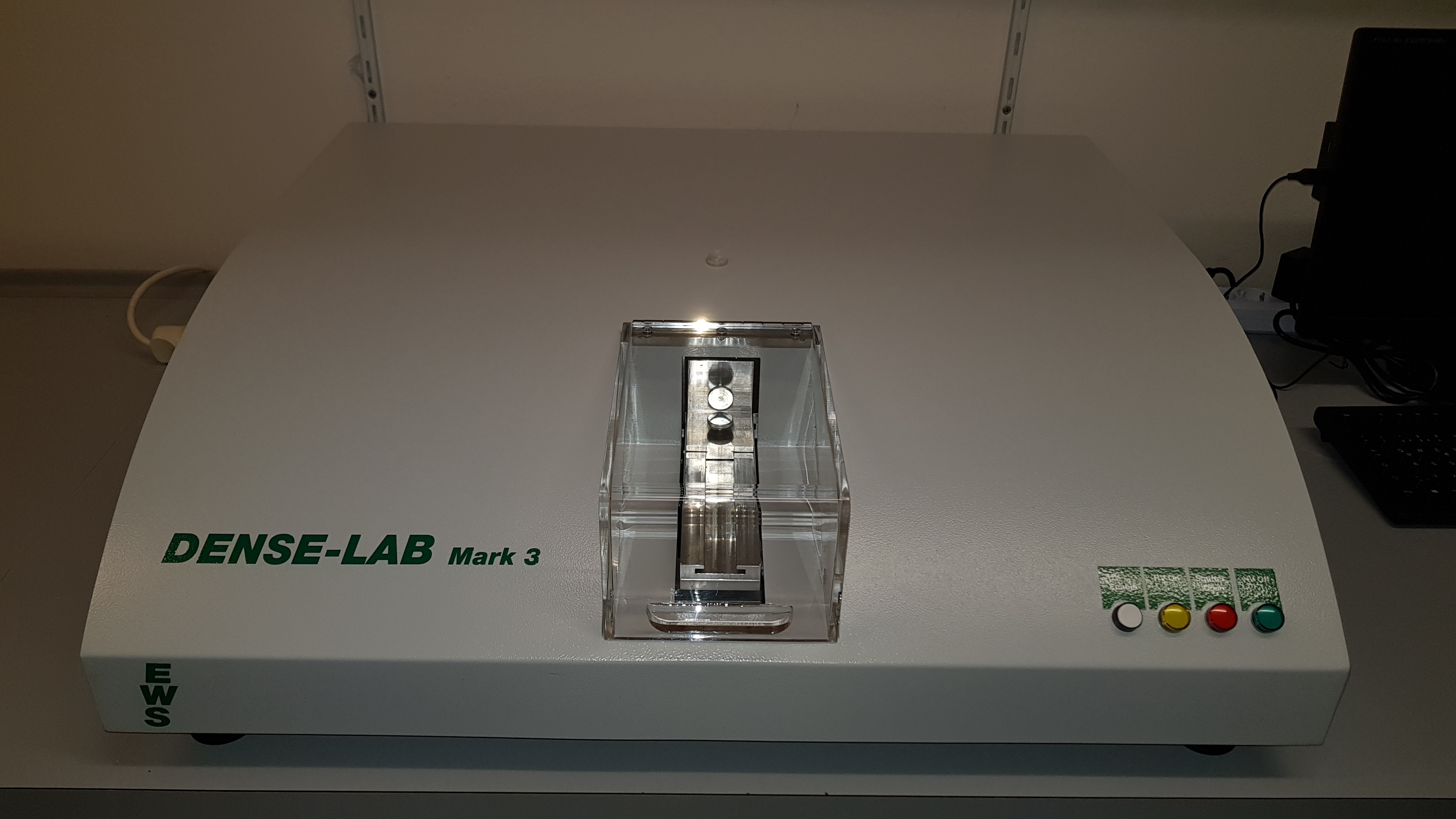 DENSE-LAB Mark 3 der Firma Electronic Wood Systems